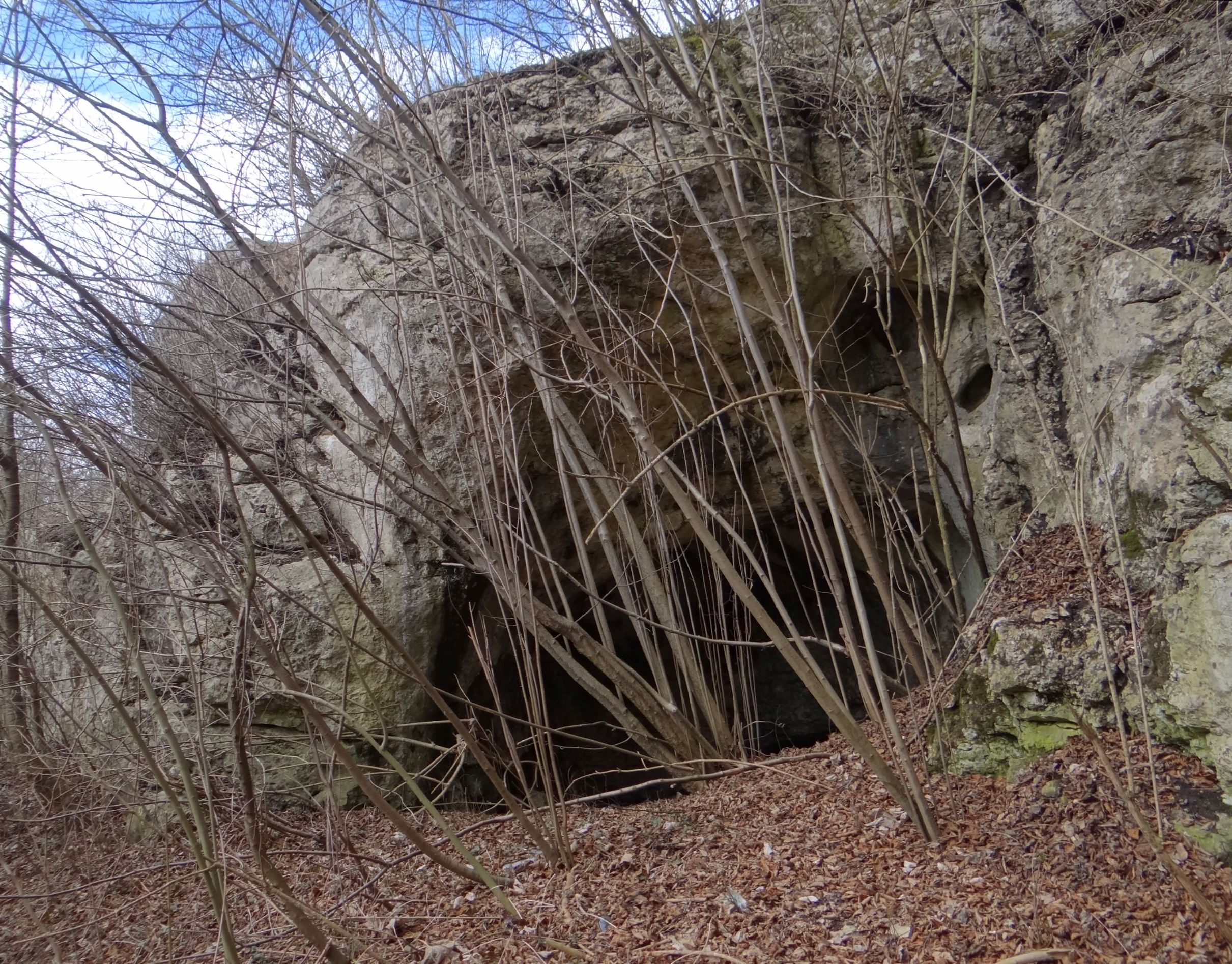 Schronisko Puste